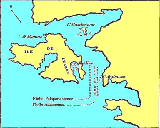 Arginuses_battle.jpg